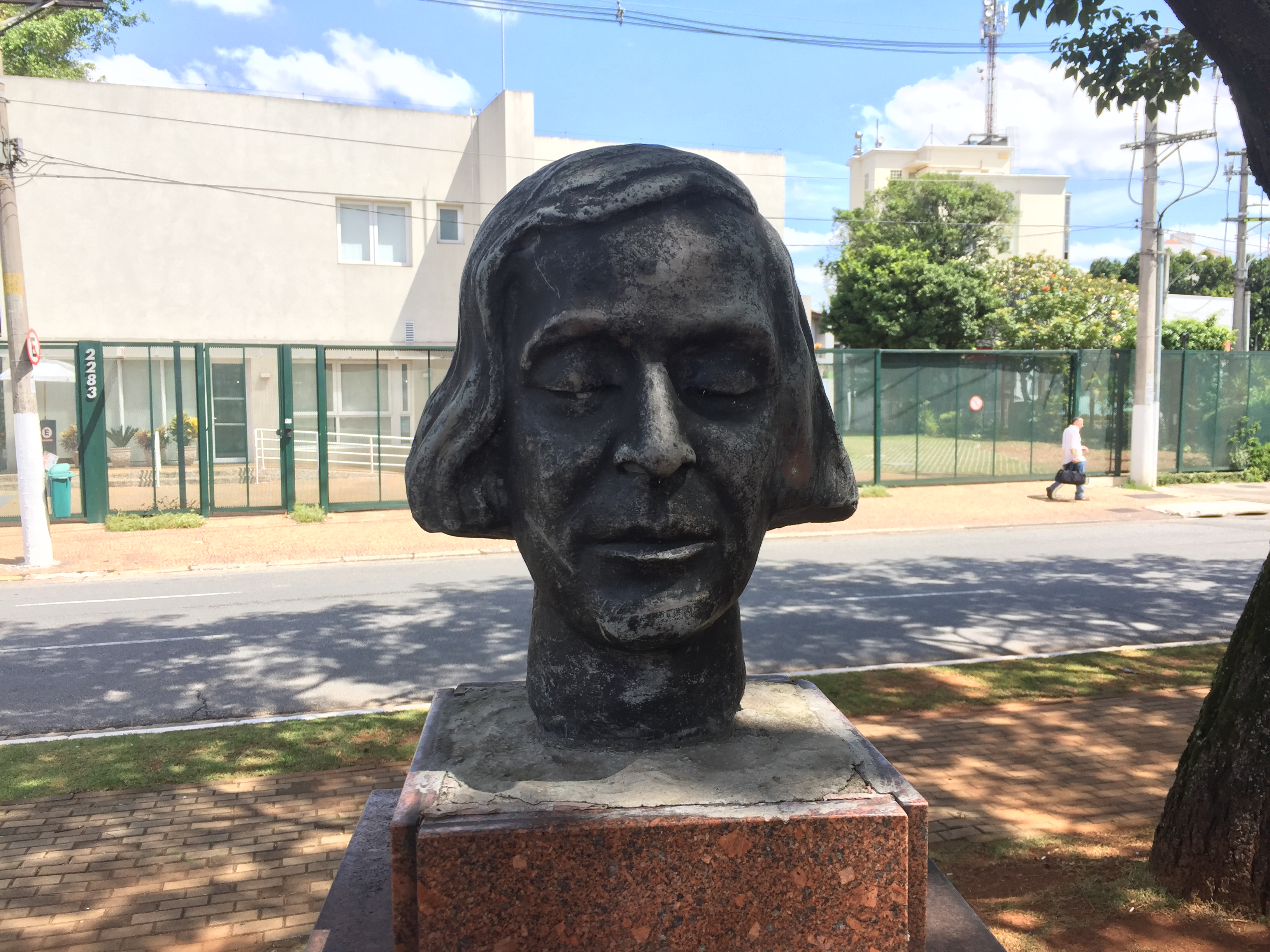 Visão aproximada do busto de Antonietta Rudge, em São Paulo, Brasil